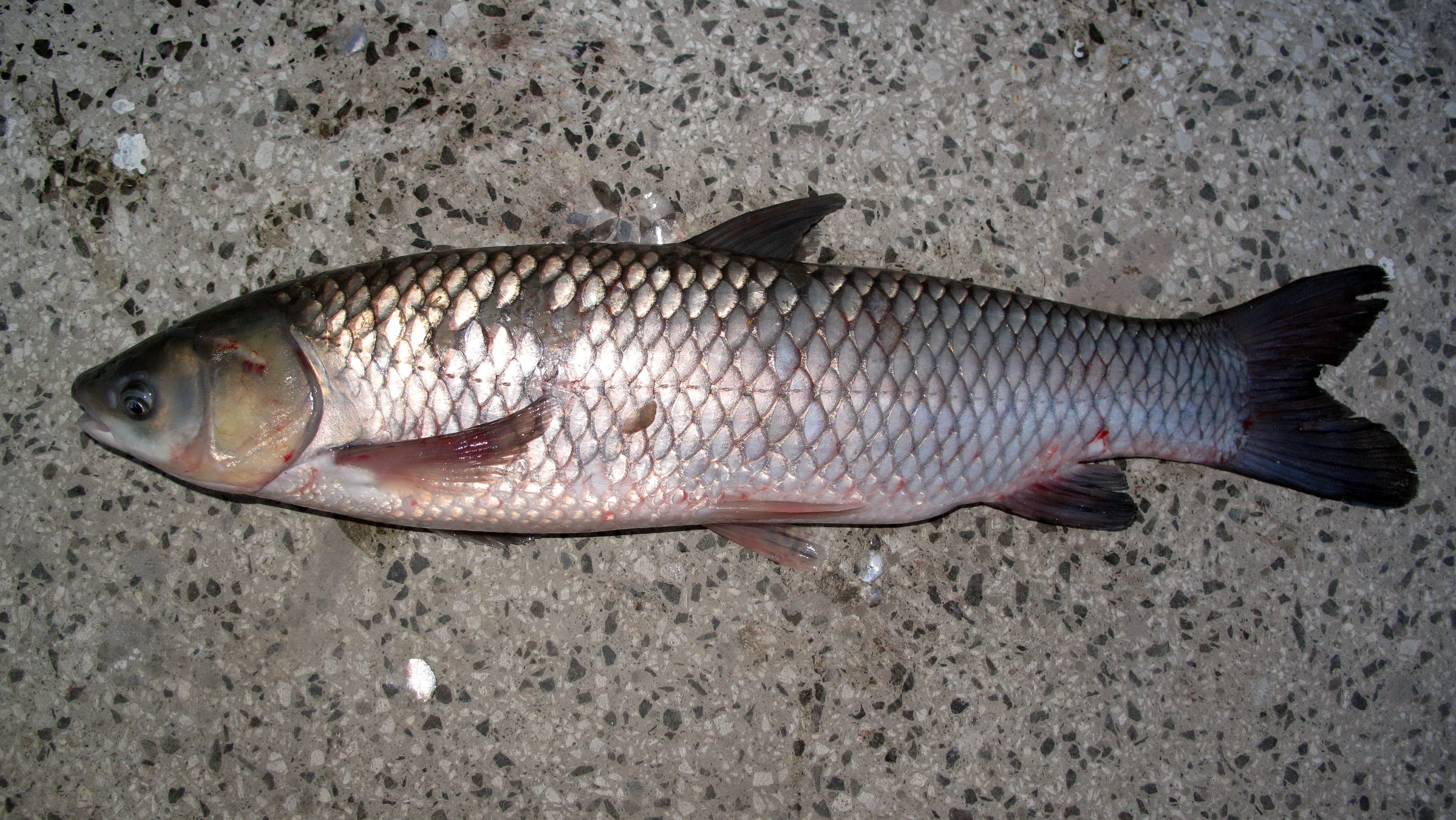 Amur bílý, samec, váha: 1,8 kg Ctenopharyngodon idella